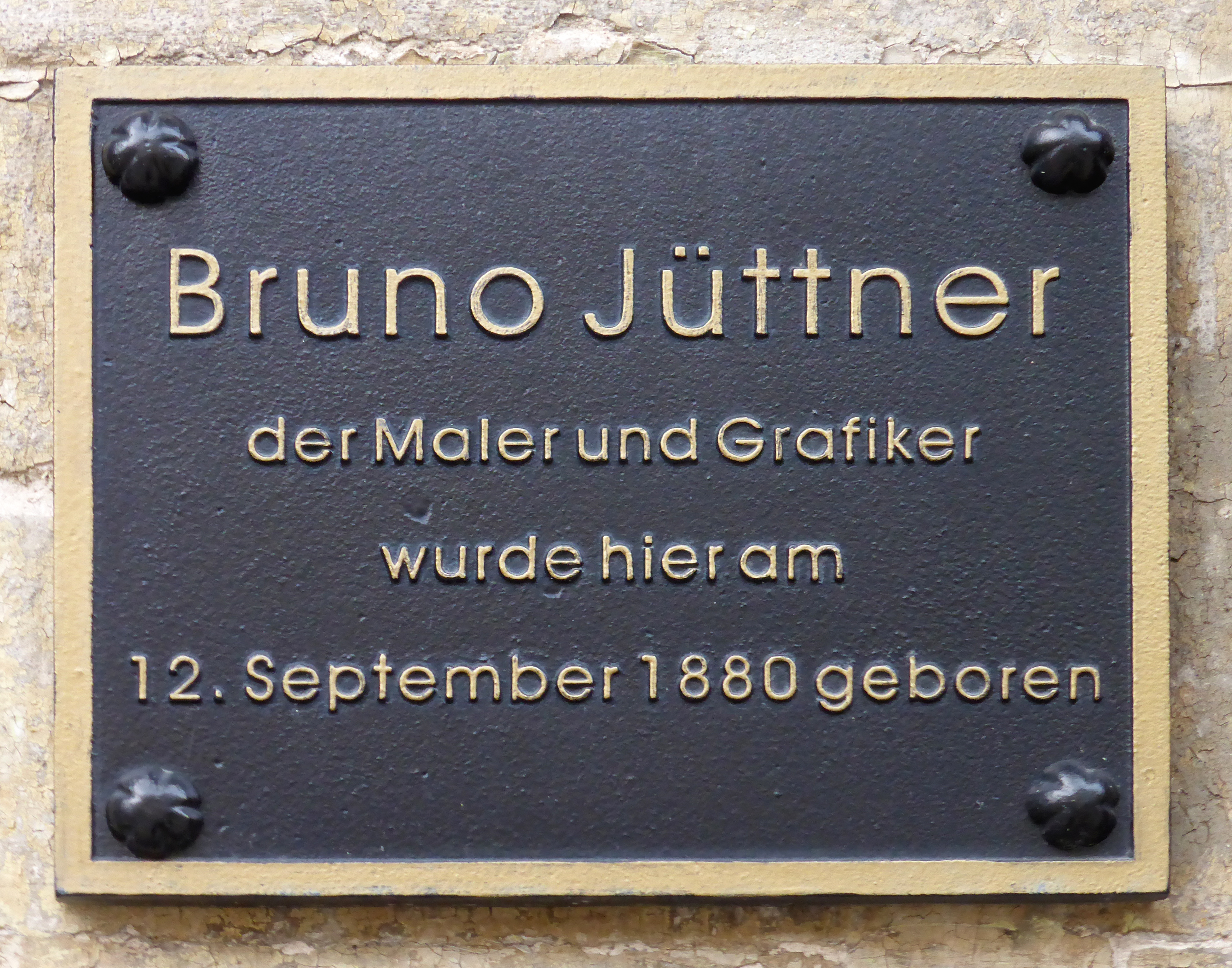 Jüttners Buchhandlung, Westernstraße, Wernigerode, Bruno Jüttners Geburtshaus.